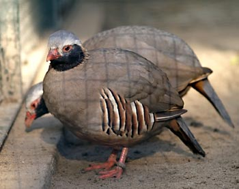 Philby-Steinhuhn (Alectoris philbyi) im Tierpark Berlin